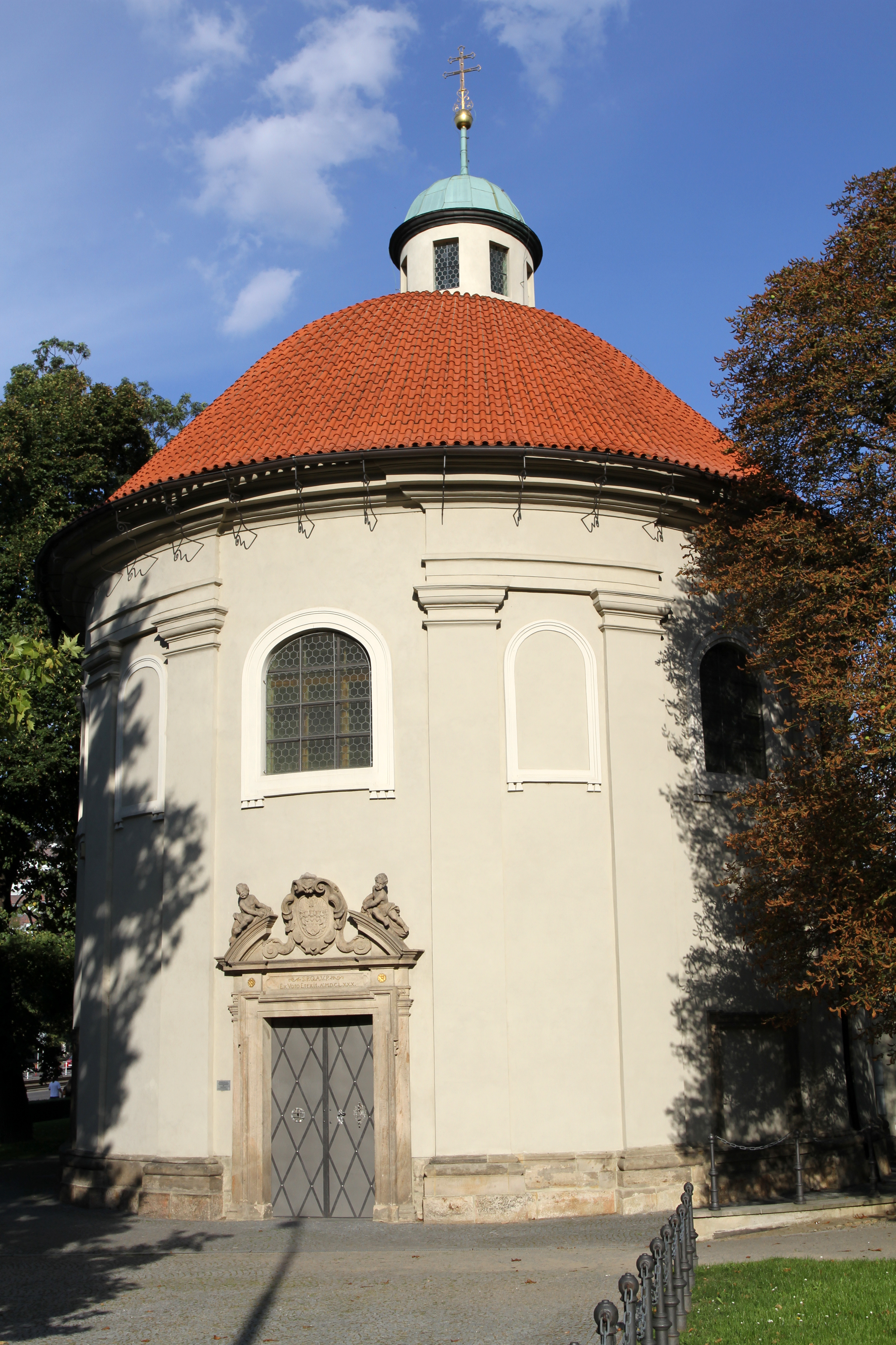 Kostel sv. Rocha (Žižkov), Praha 3, Olšanská, Olšanské nám., Žižkov